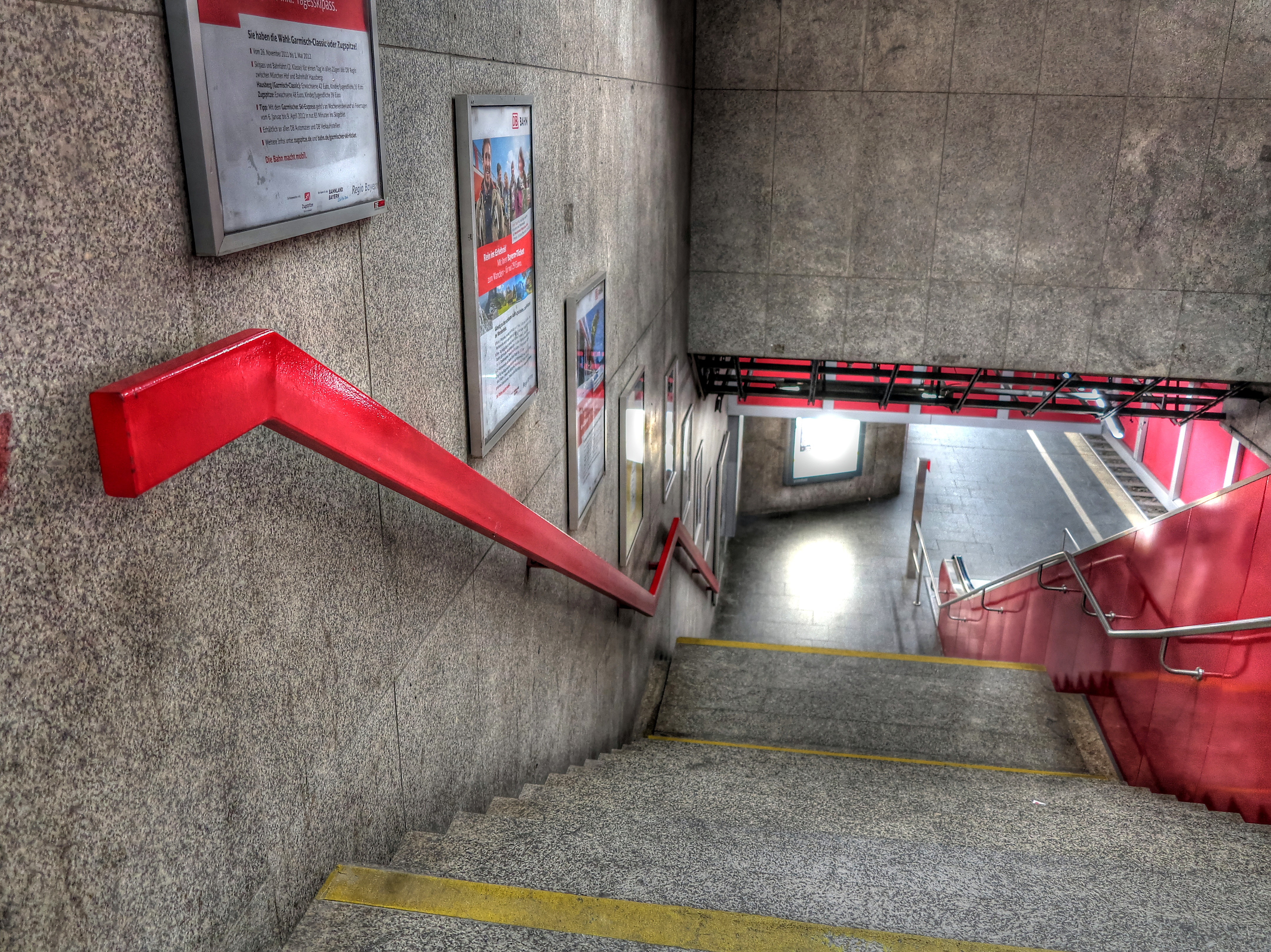 Deutschland, Bayern, München, Hauptbahnhof, Zugang zu S-Bahn Stammstrecke